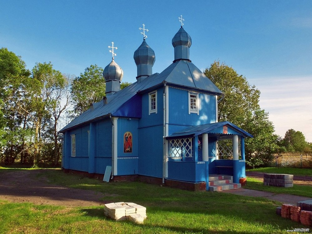 Вяляцічы. Царква Раства Багародзіцы